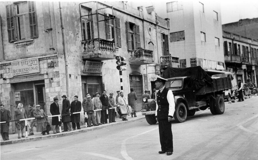 הרמזור הראשון שהוצב בתל אביב ברחוב הרצל